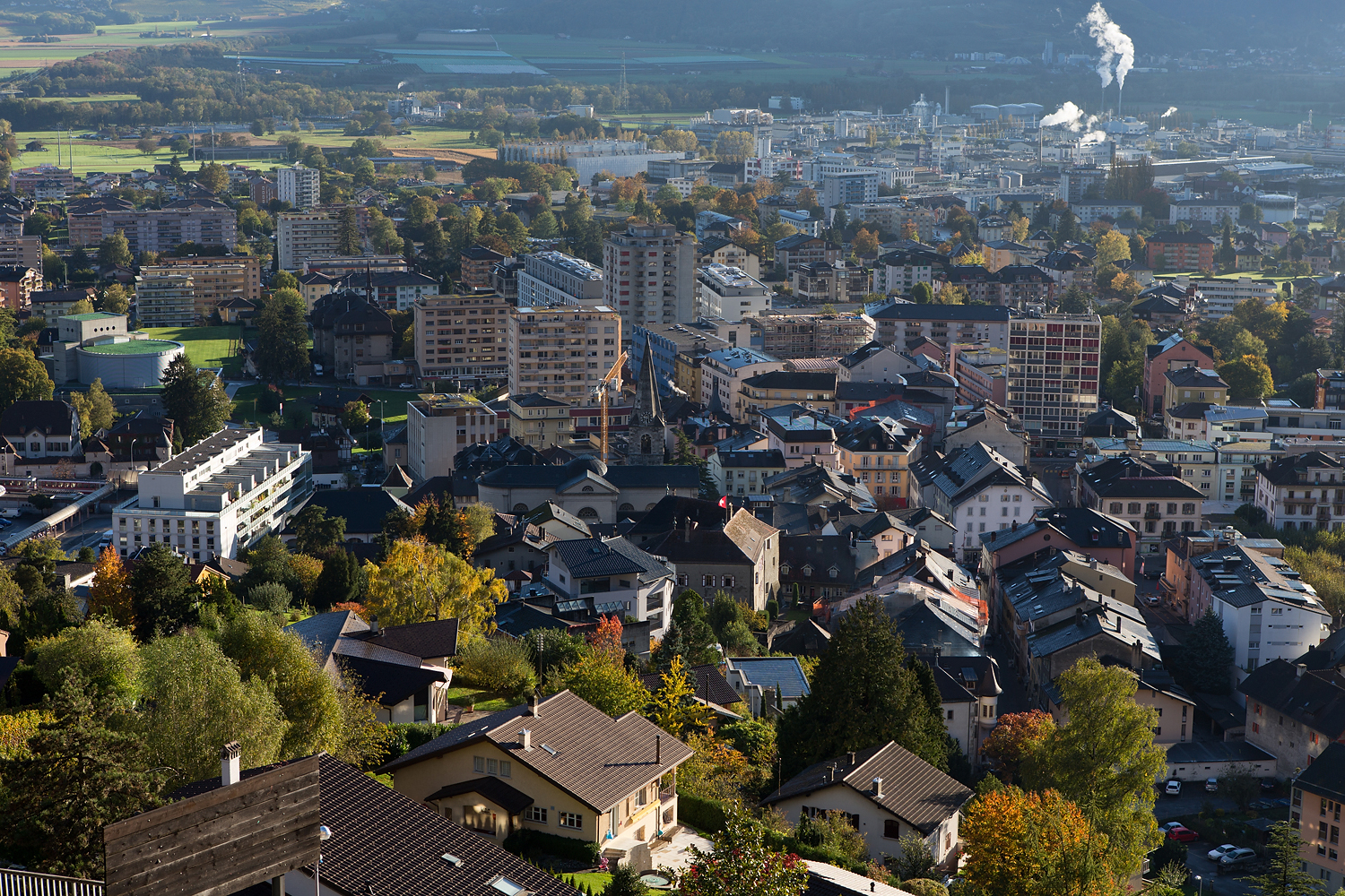 Monthey (VS)